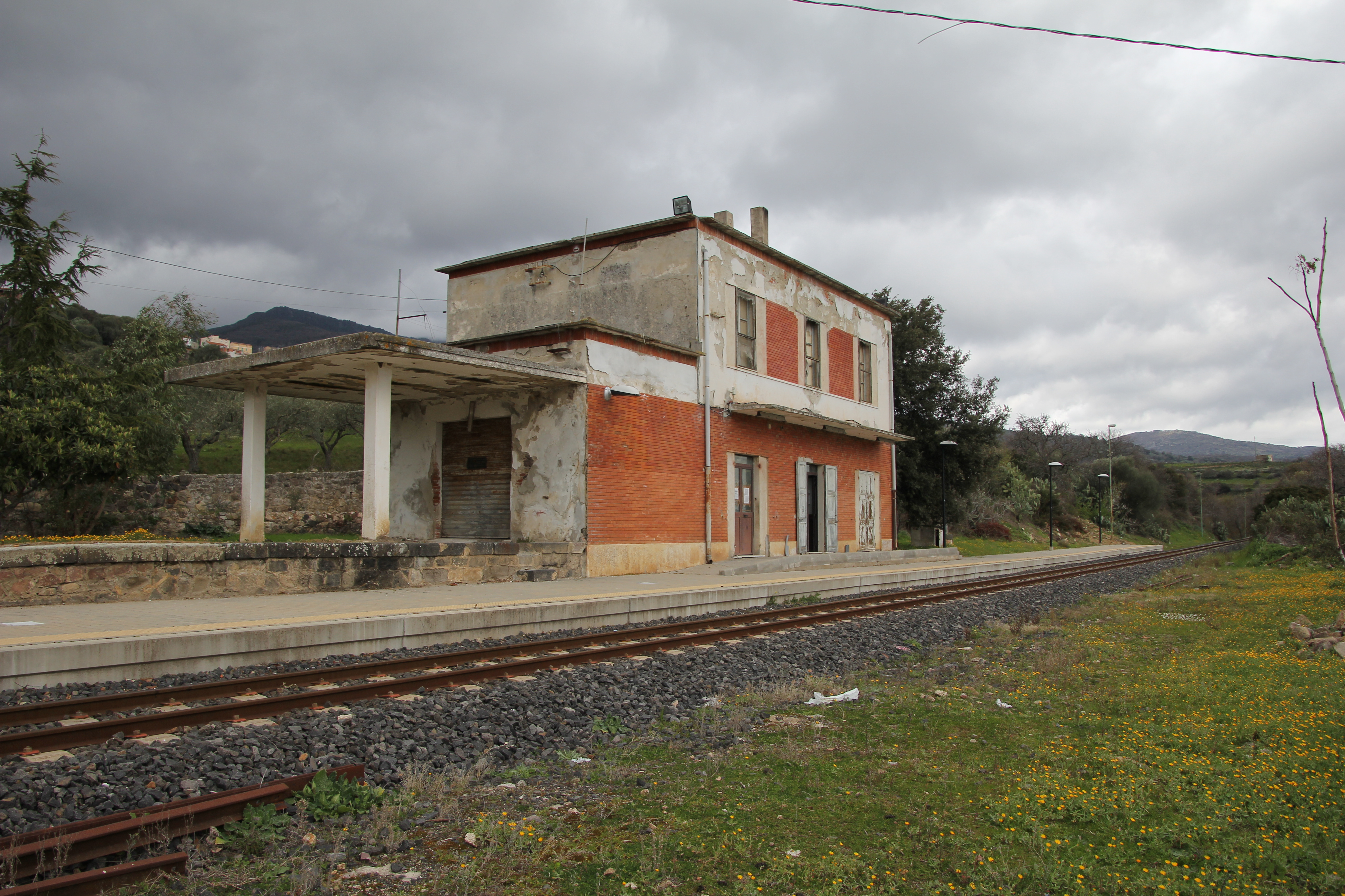 Lei, stazione ferroviaria